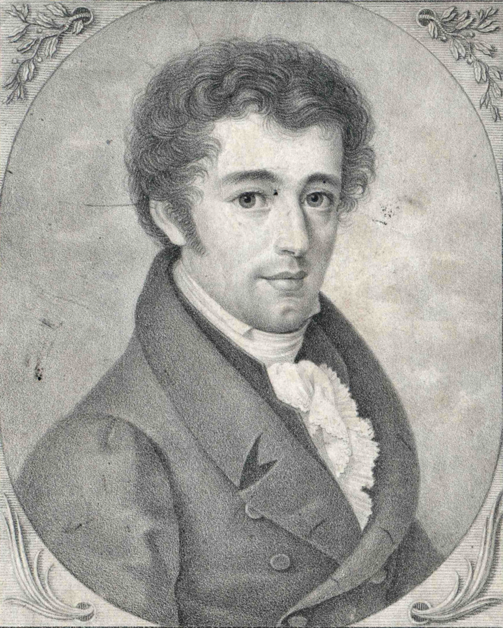 Portrait Friedrich August Wilhelm Spohns